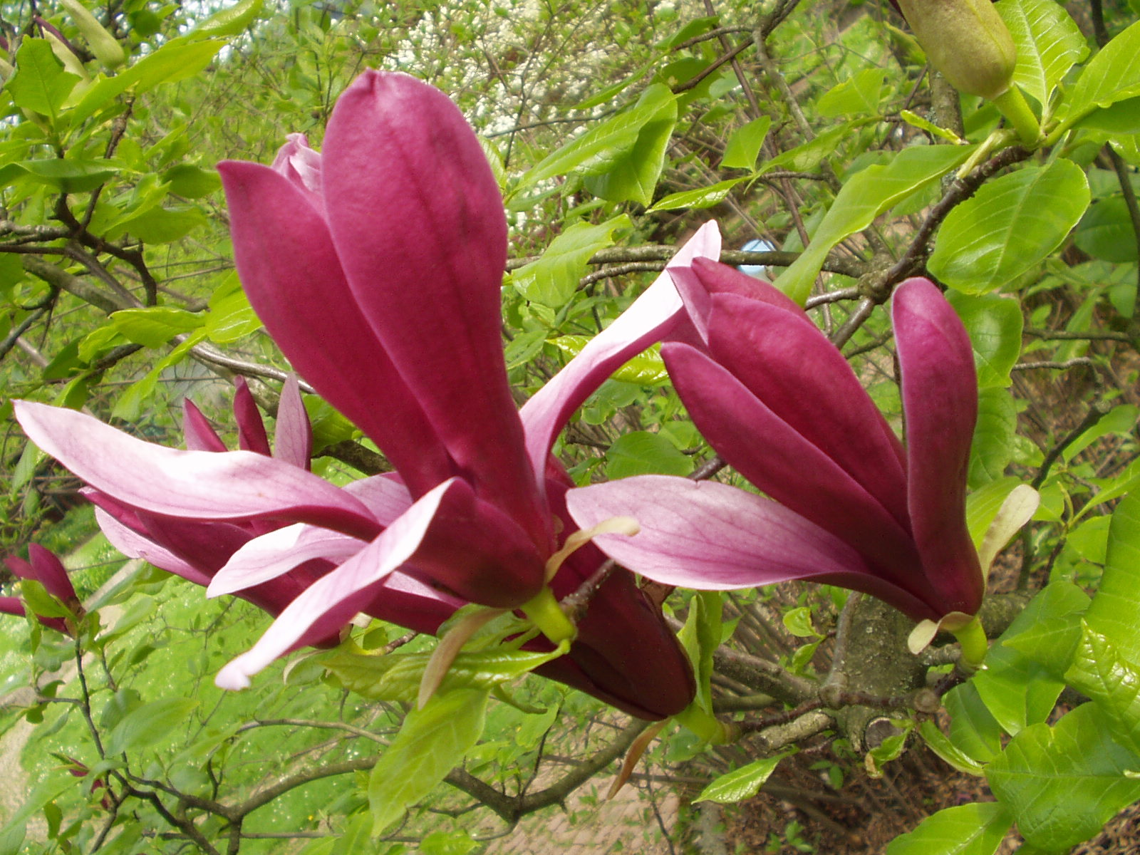 Magnolienblüte im Botanischen Garten Freiburg